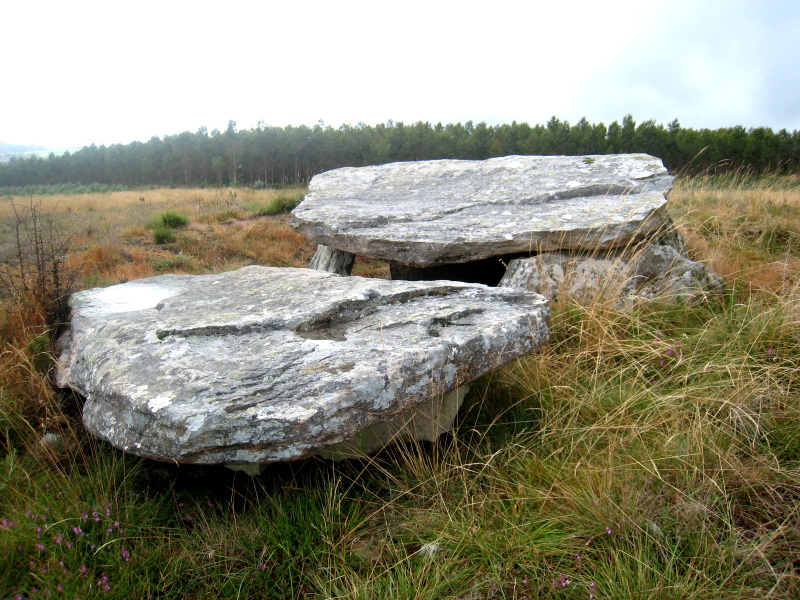 Monumento megalítico da Arca da Piosa